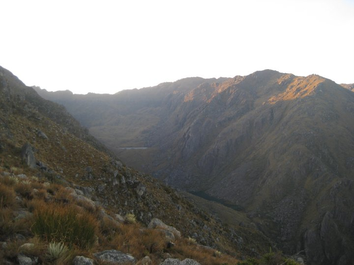 Vista del Pico El Púlpito y las Lagunas Verdes, Páramo del Batallón, Estado Táchira, Venezuela